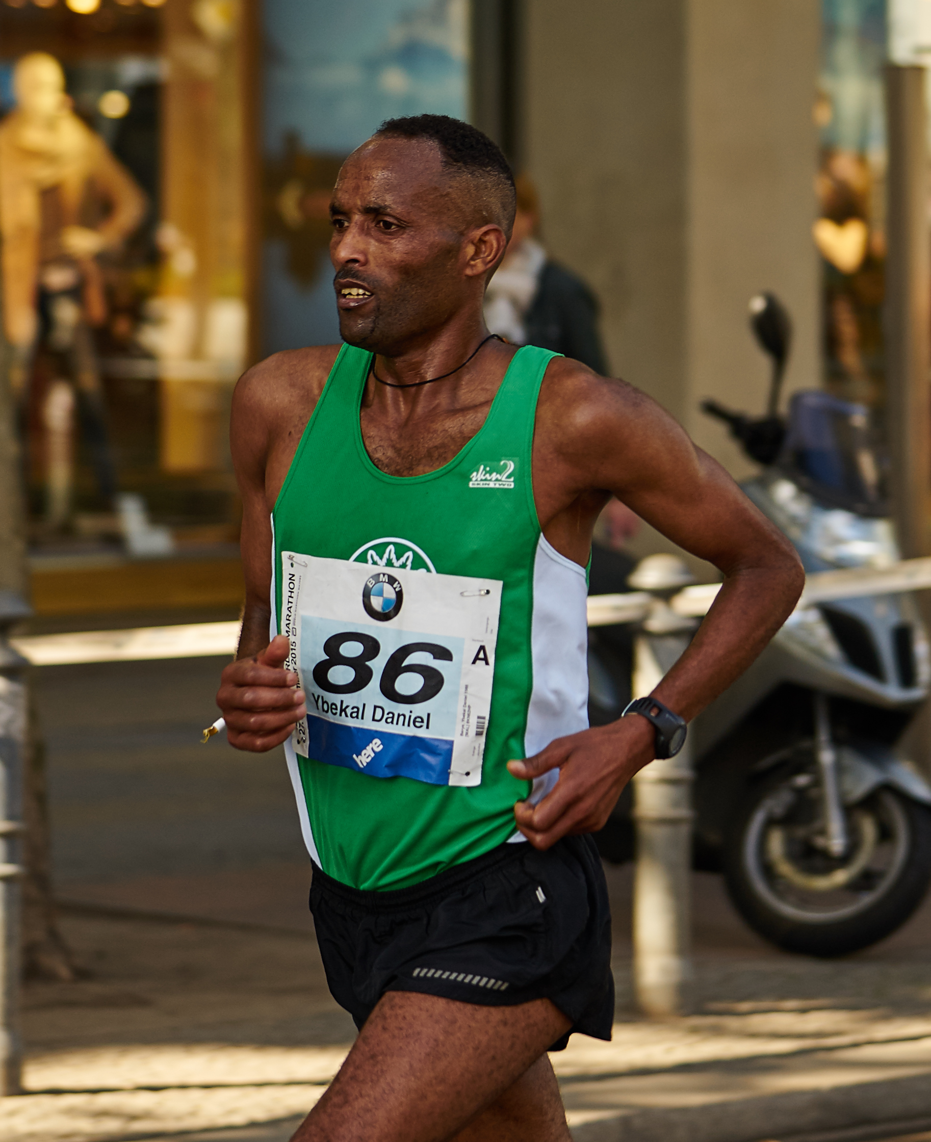 Berlin Marathon 2015 Berye, Ybekal Daniel (ETH)